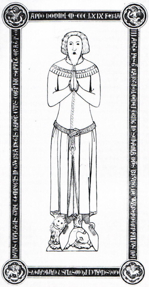 Bruno von Warendorp (* in Lübeck; † 21. August 1369), Bürgermeister von Lübeck. Zeichnung seiner Grabplatte in der Lübecker Marienkirche.